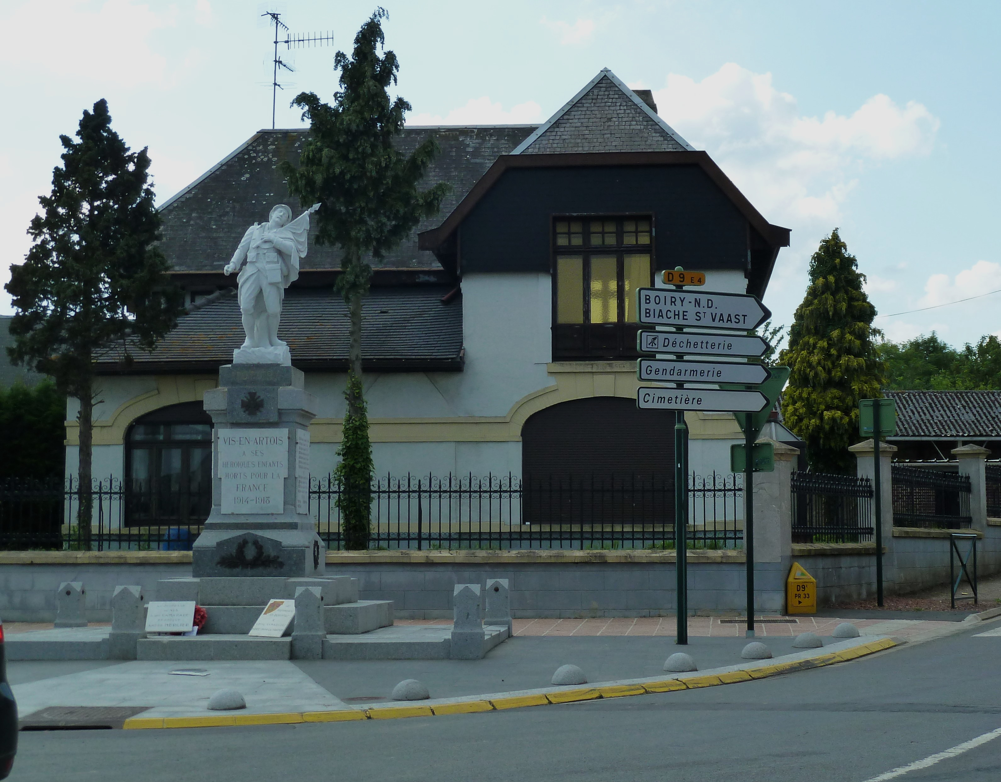 Vis-en-Artois le monument aux Morts, Pas-de-Calais.- France.